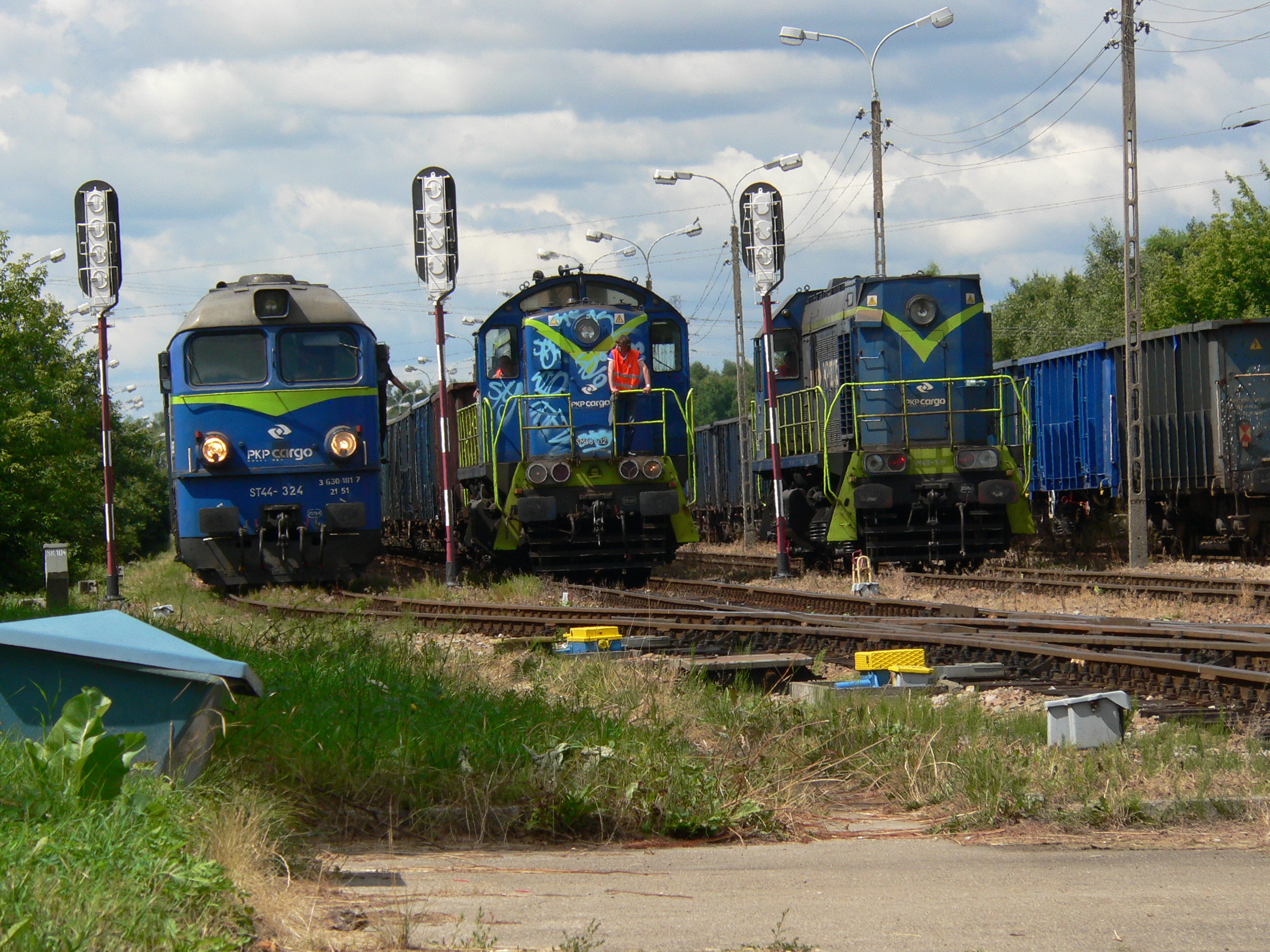 Manewry pociągów towarowych na stacji przeładunkowej w Jeziornie, na linii kolejowej nr 937, Konstancin-Jeziorna